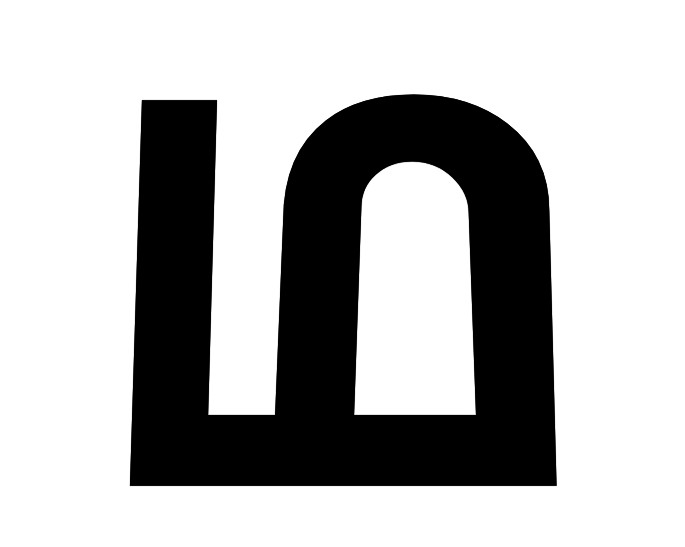 ഥ മലയാളം അക്ഷരം